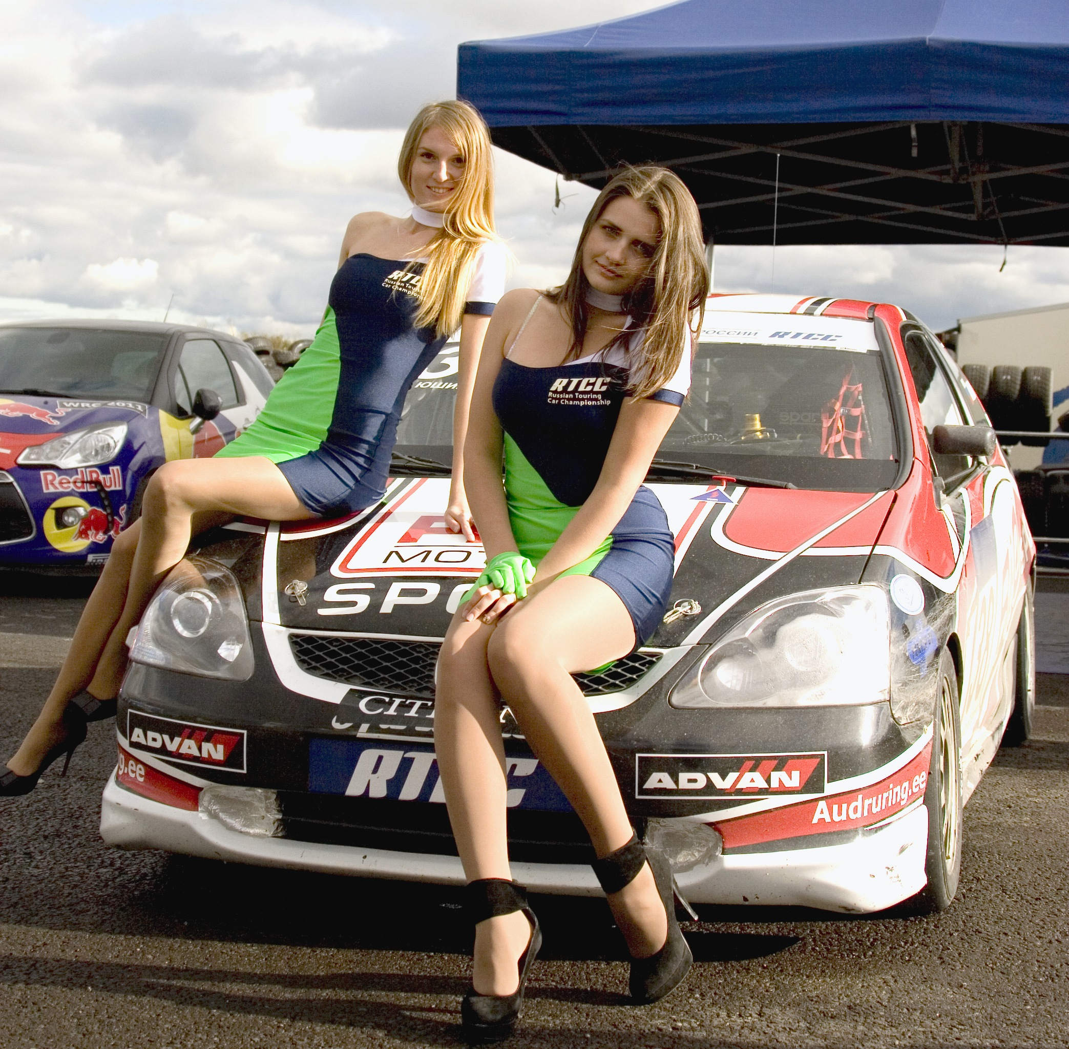 Russian grid-girls. Marina Kuznetsova and Lilia Osipova. Russian Touring Car Championship (RTCC). Saint-Peterburg. 25.09.2011